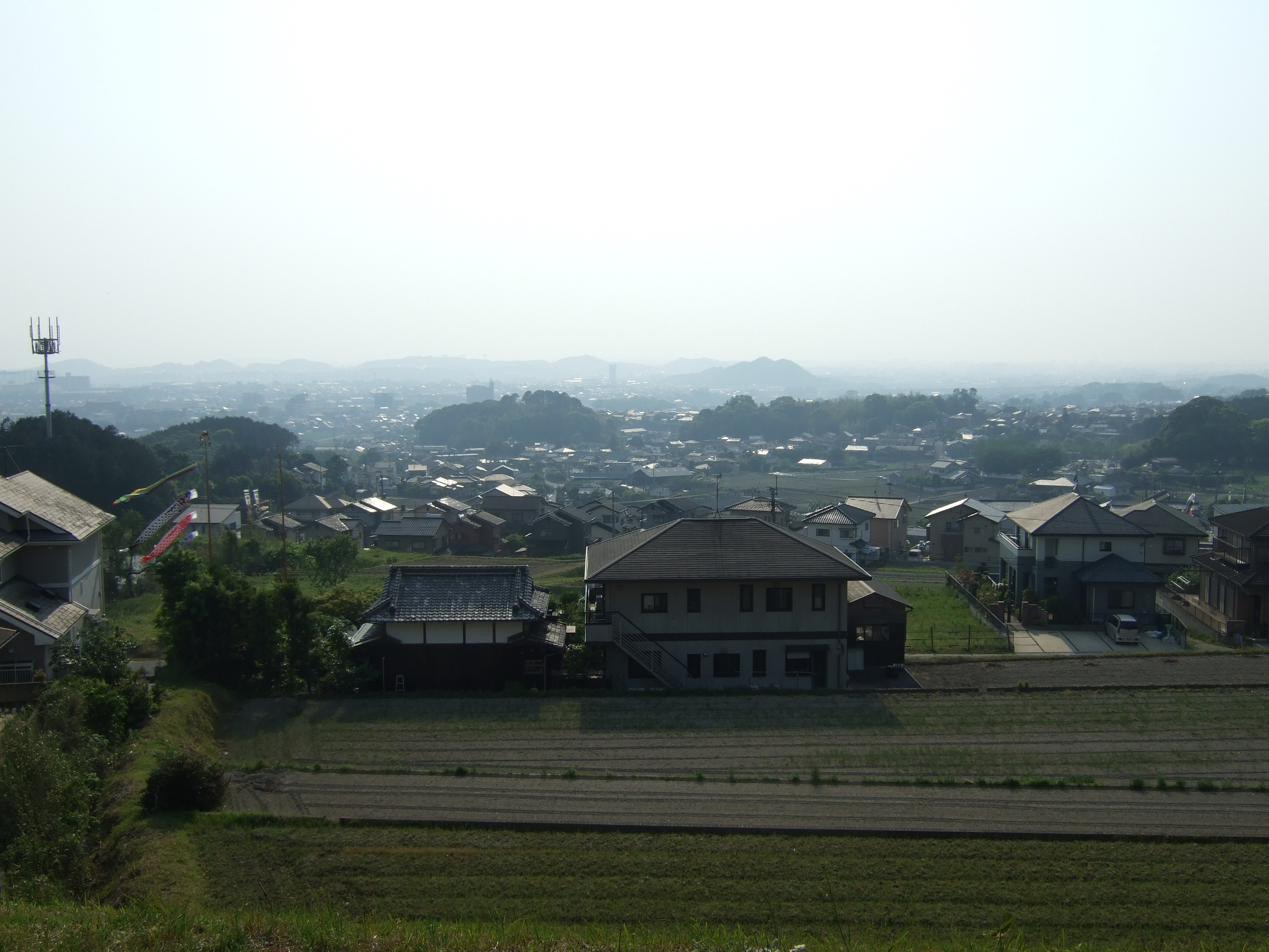 Veduta di Sue Machi